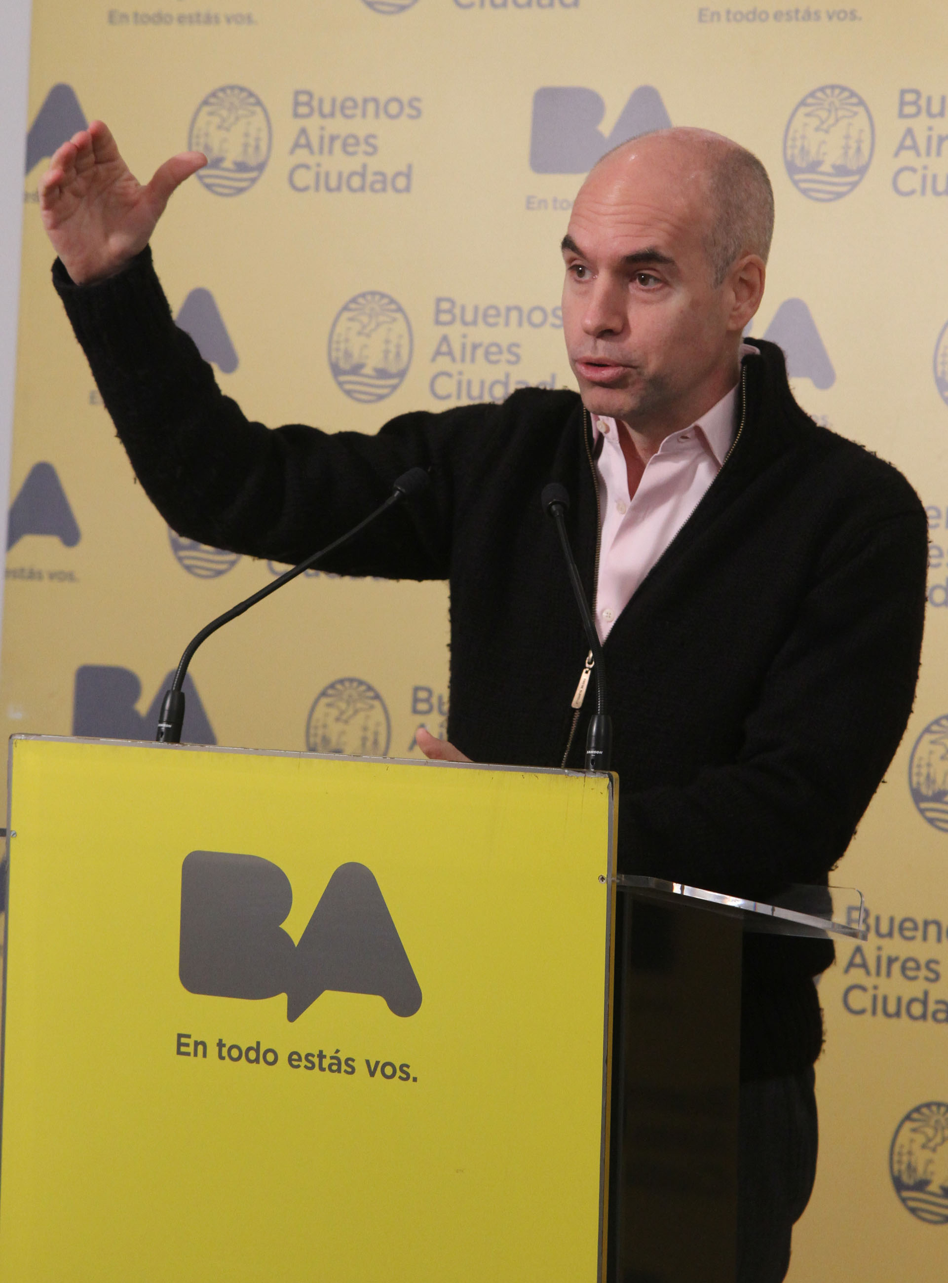 El jefe de Gabinete, Horacio Rodrí­guez Larreta, formuló declaraciones a la prensa al término de la reunión semanal del gabinete porteño, que se celebró esta mañana en el Jardín Botánico. Foto: Matías Repetto/GCBA